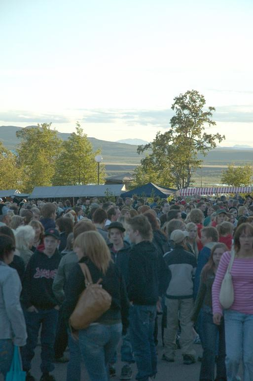 Kirunafestivalen. Motiv: Kiruna Nyckelord: Riksintressen Kategori: Stadsmiljö Kirunafestivalen.